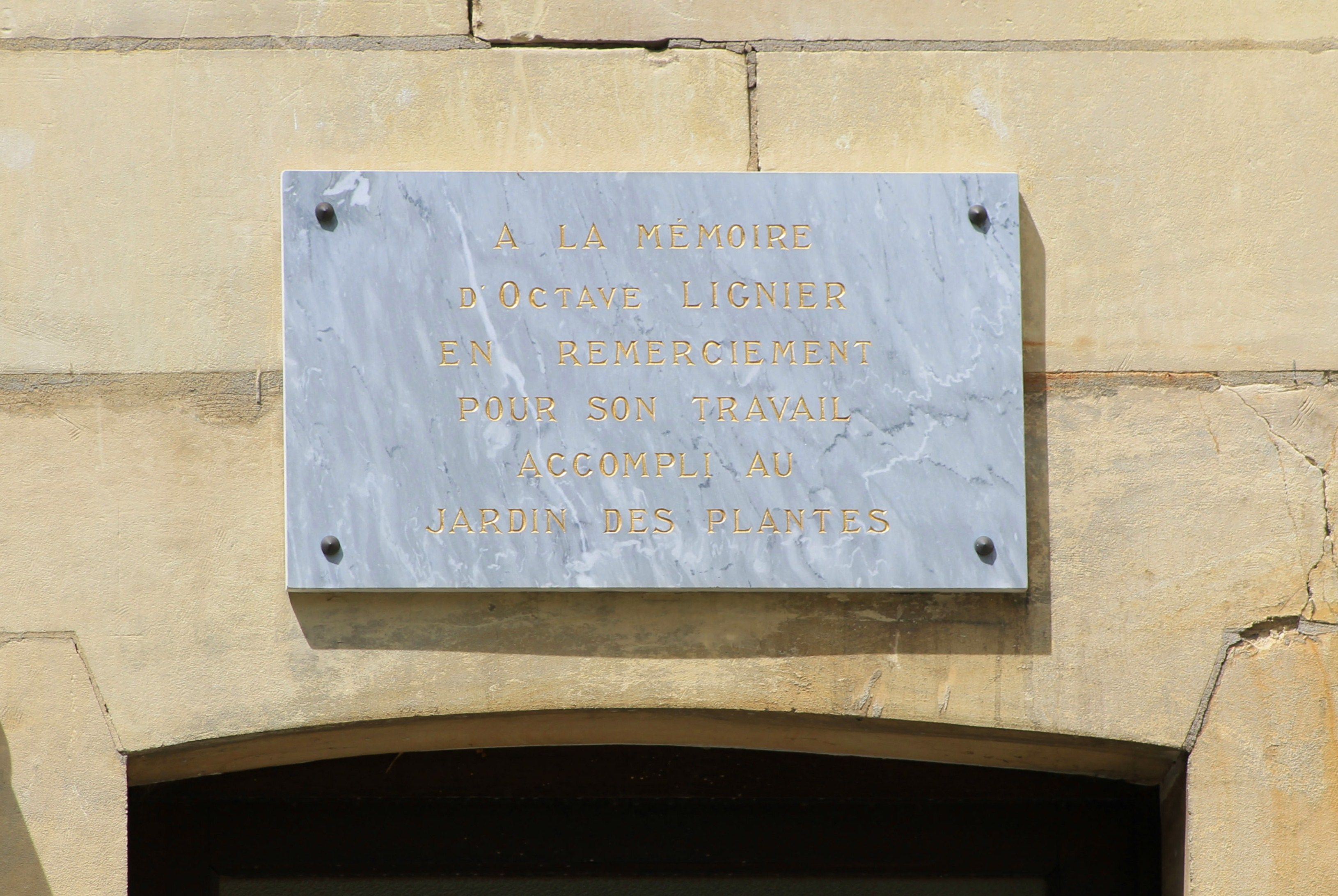 Plaque: "A la mémoire d'Octave Lignier en remerciement pour son travail accomplit au Jardin des Plantes" sur la façade arrière de l'institut botanique du Jardin des plantes de Caen (Calvados)